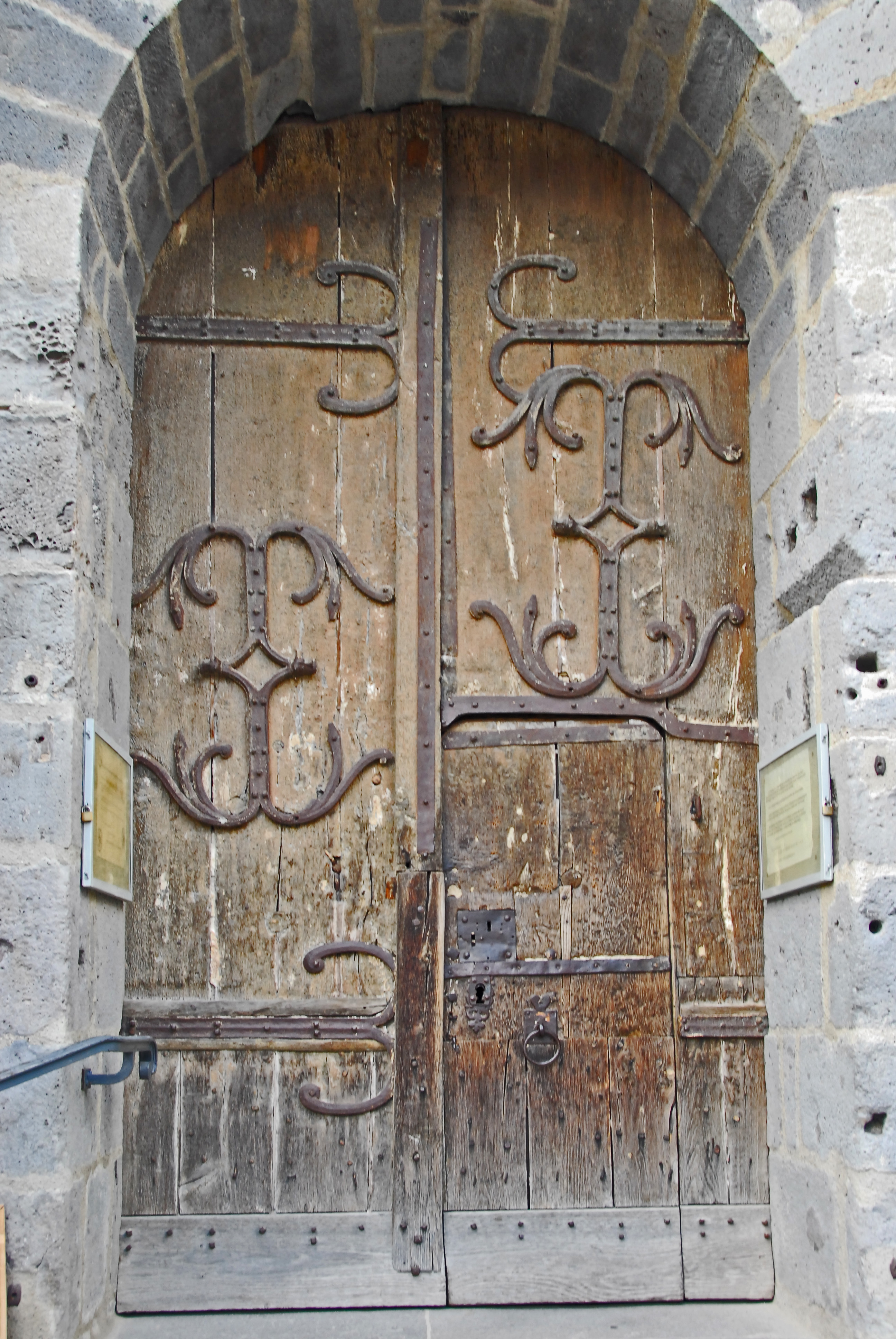 N.-D.d'Orcival, südl. Querhausarm, Nebenportal